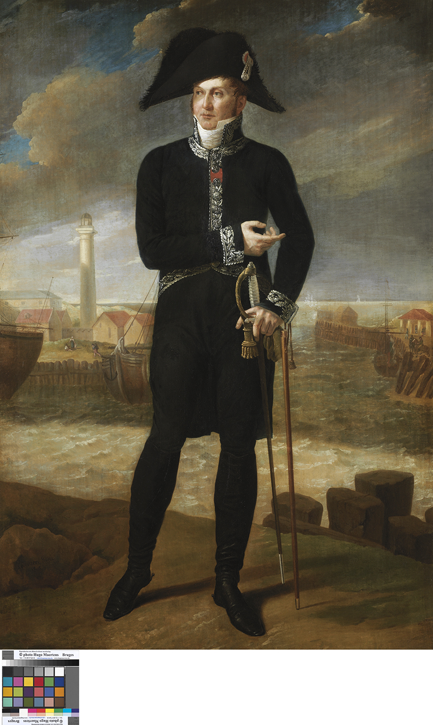 Portret van markies Bernard-François de Chauvelin (Joseph Denis Odevaere, 1805); collection: Musea Brugge - Groeningemuseum